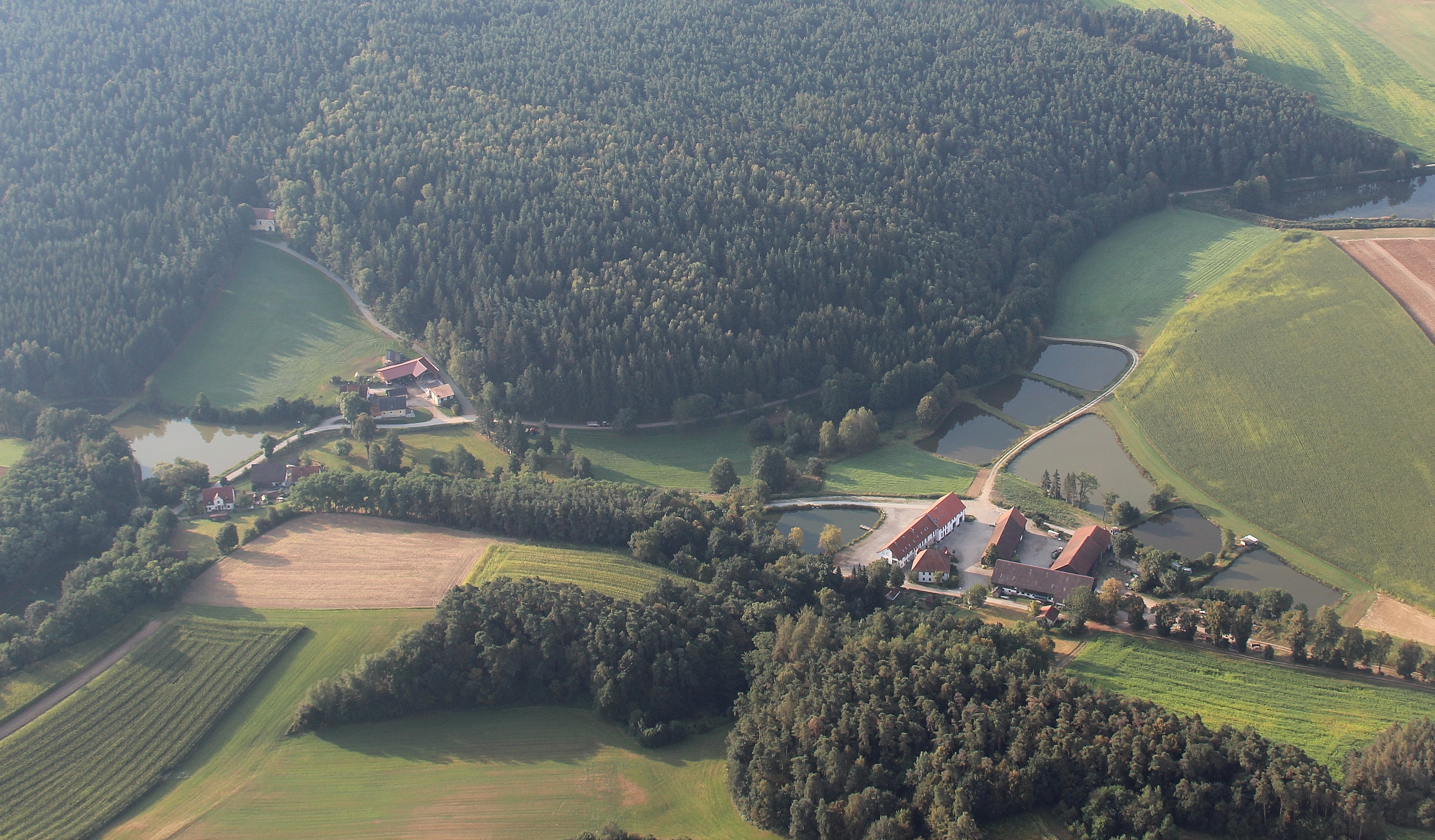 Büchlhof (Bildmitte rechts), Kemnathermühle Bildmitte links unten), Neuhäusl (Bildmitte links oben) und Kirche Büchlberg (im Wald); Stadt Neunburg vorm Wald, Landkreis Schwandorf, Oberpfalz, Bayern